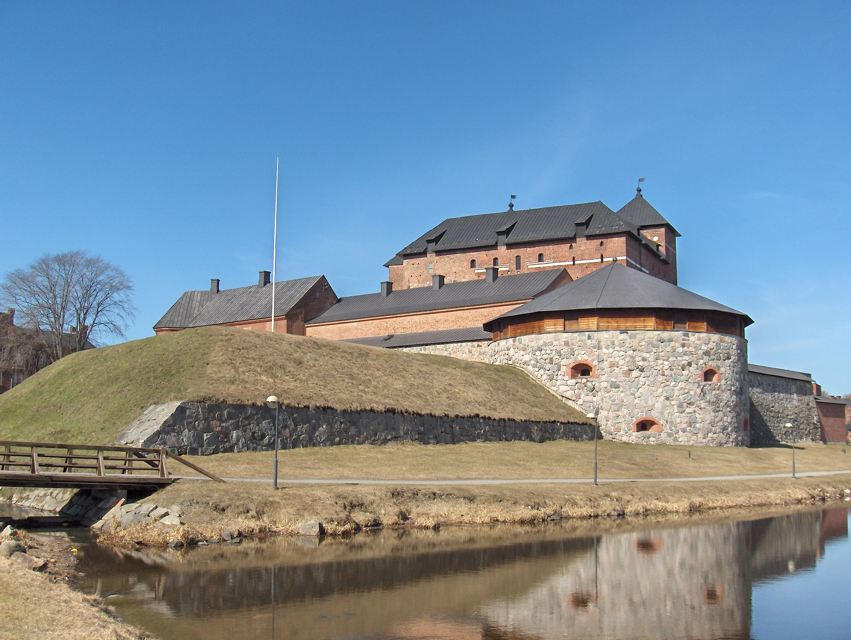 Häme Castle, Hämeenlinna, Finland